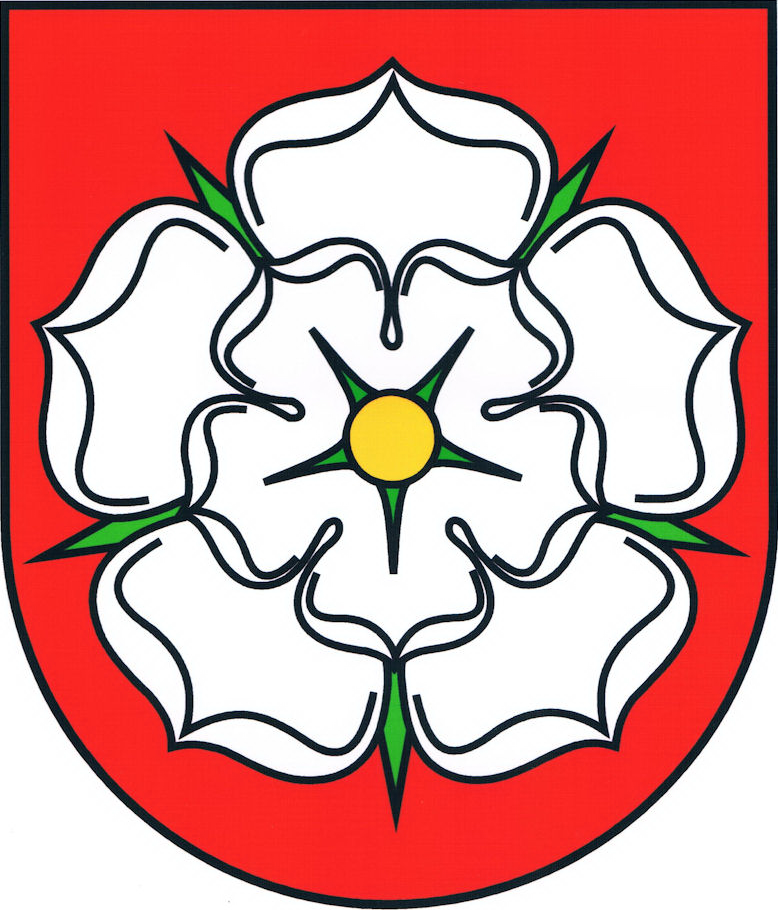 Herb gminy Wierzbica w powiecie radomskim.